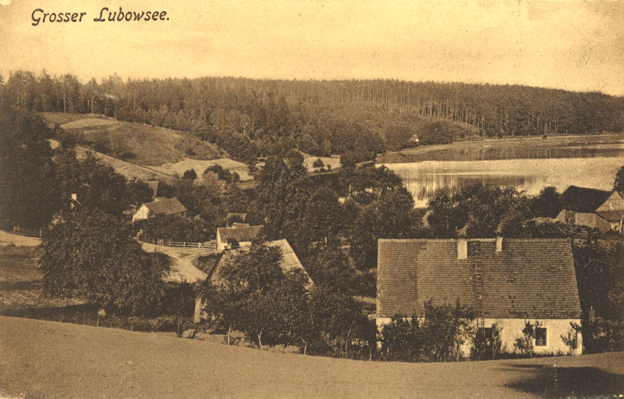 Zühlsdorf Gemeinde Mühlenbecker Land: Blick auf den Lubowsee